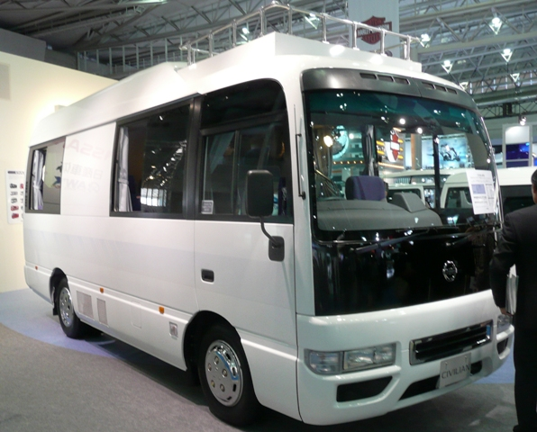 Nissan Civilian.